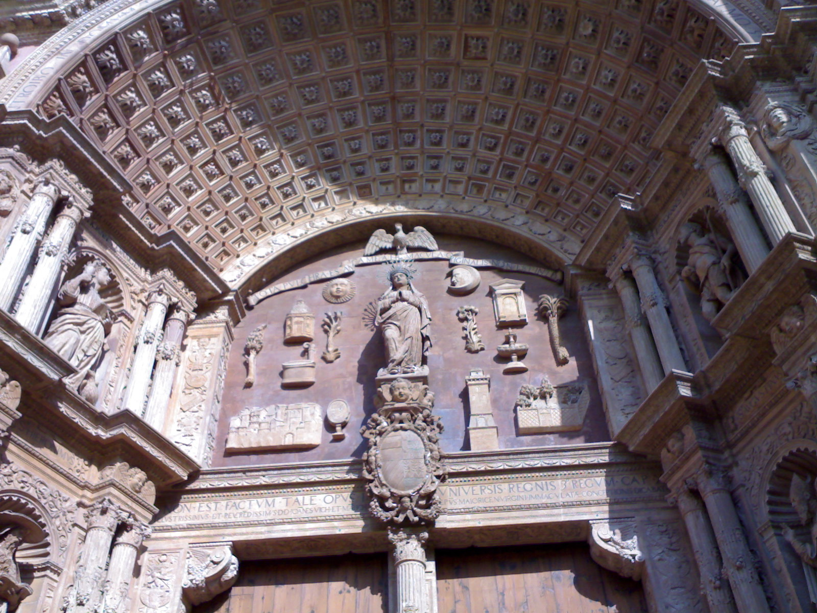 Sa Seu, detalle de la fachada. Cathedral of Palma.